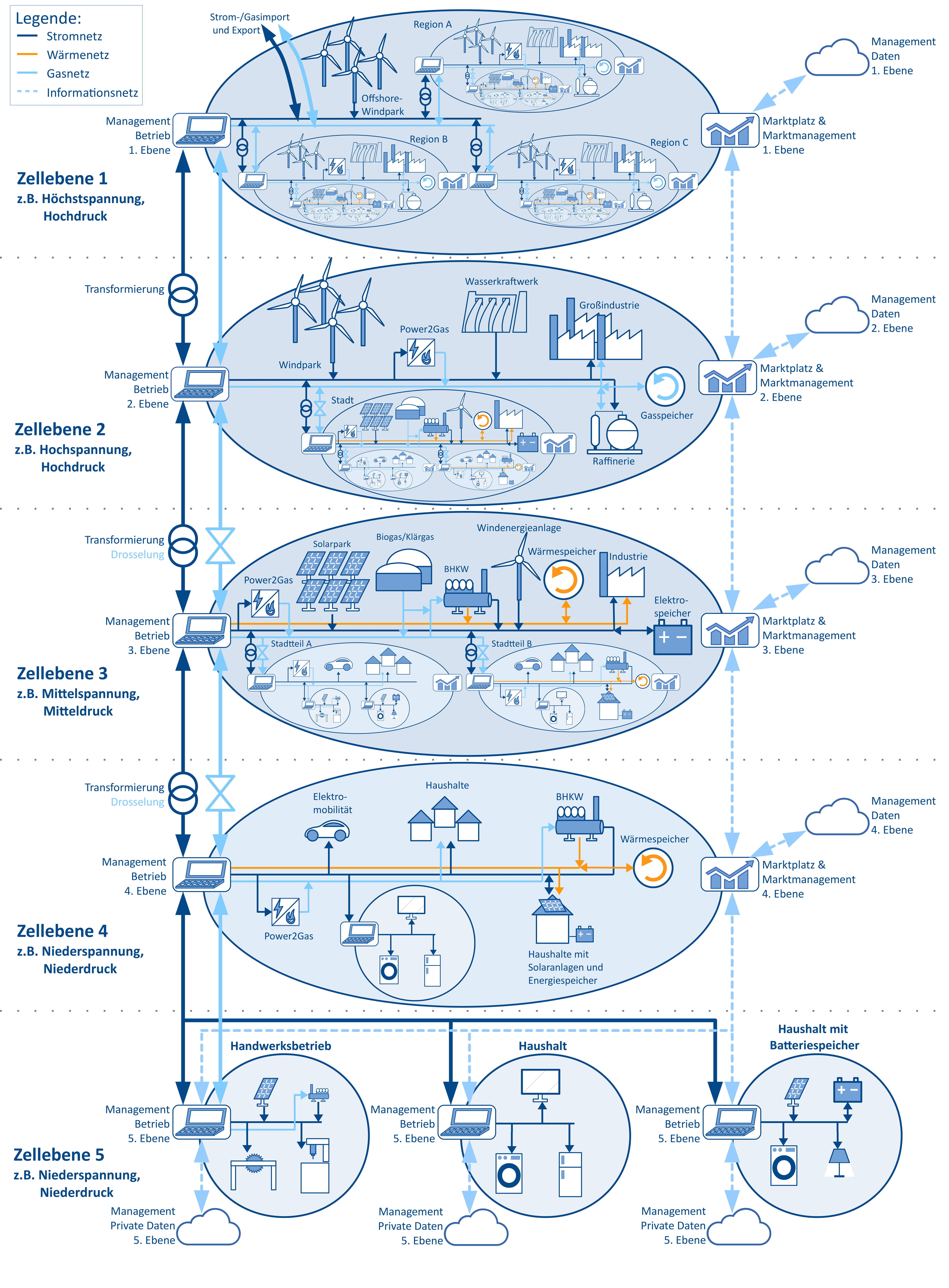 Dargestellt ist das Zellulare Energiesystem. Dabei sind die Zellebenen sowie die Technologien innerhalb der Zellen dargestellt.